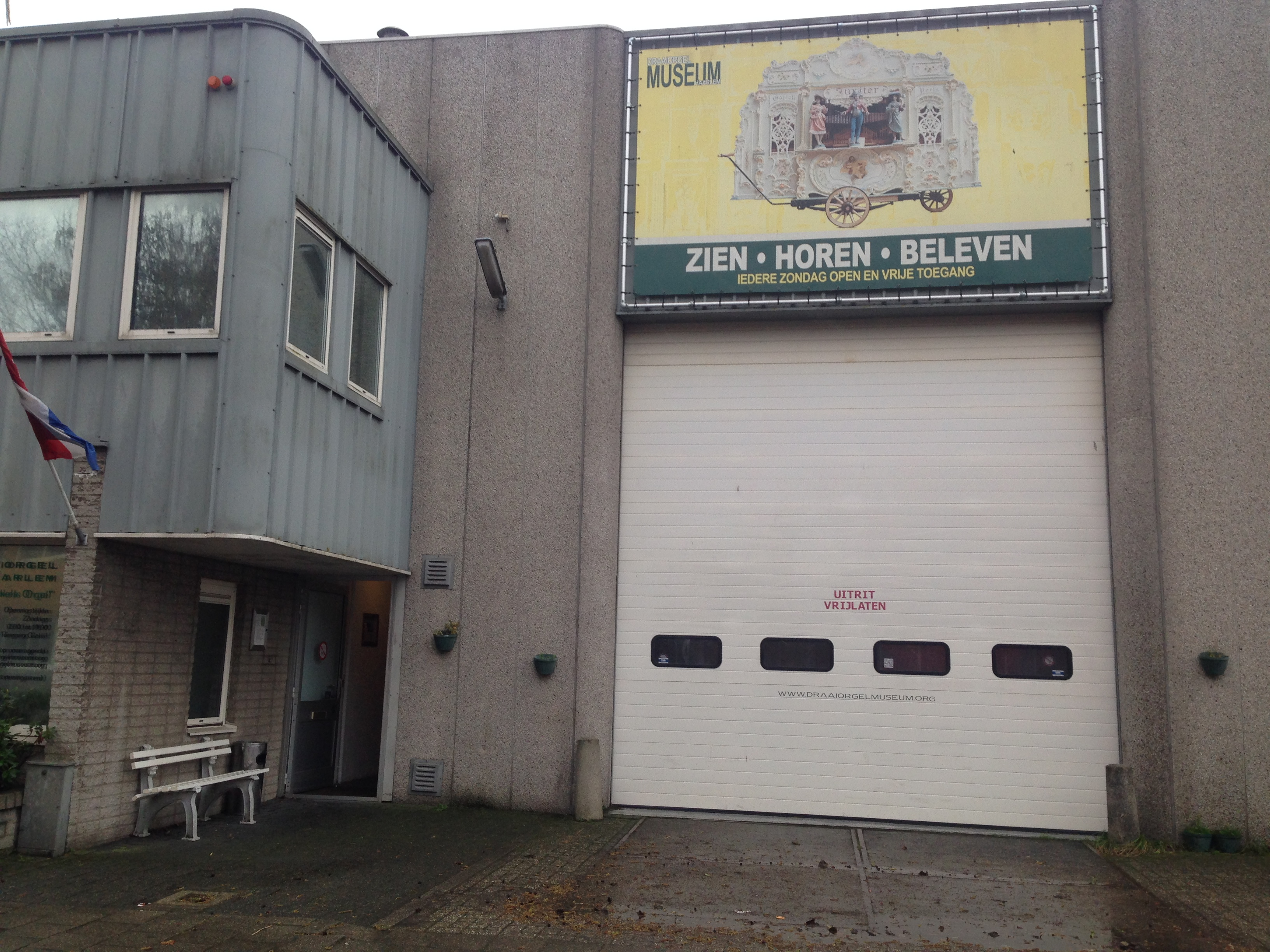 Draaiorgelmuseum, Haarlem, Netherlands